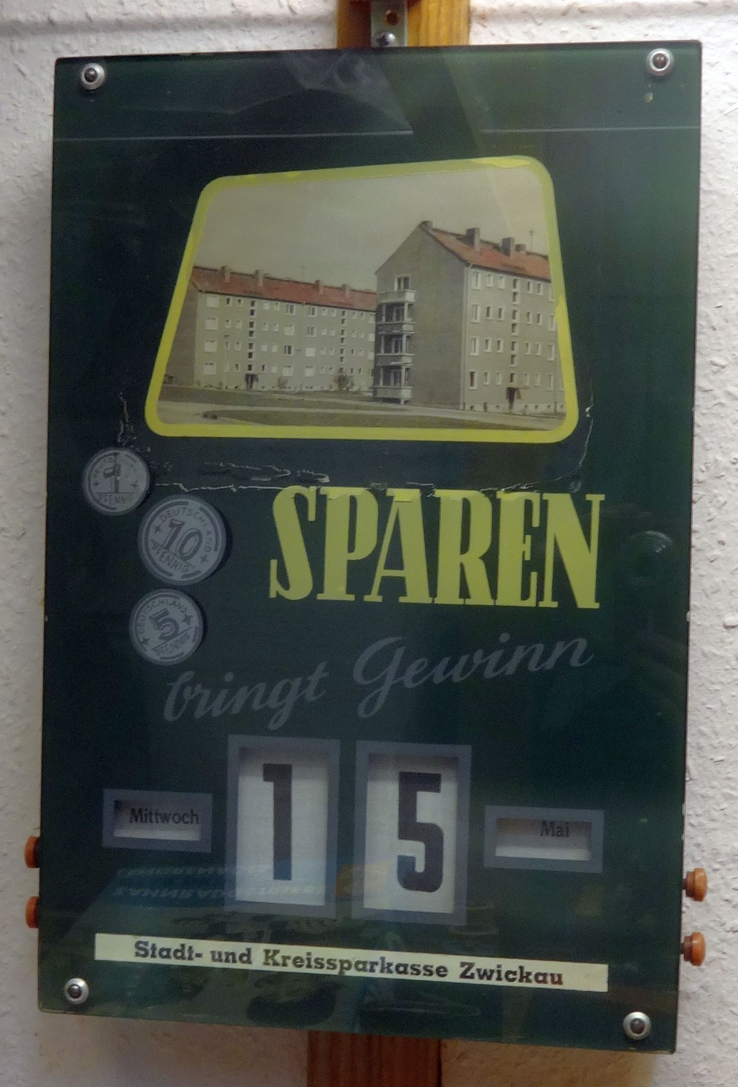 Stadt- und Kreissparkasse Zwickau "Sparen bringt Gewinn" im DDR-Museum Pirna